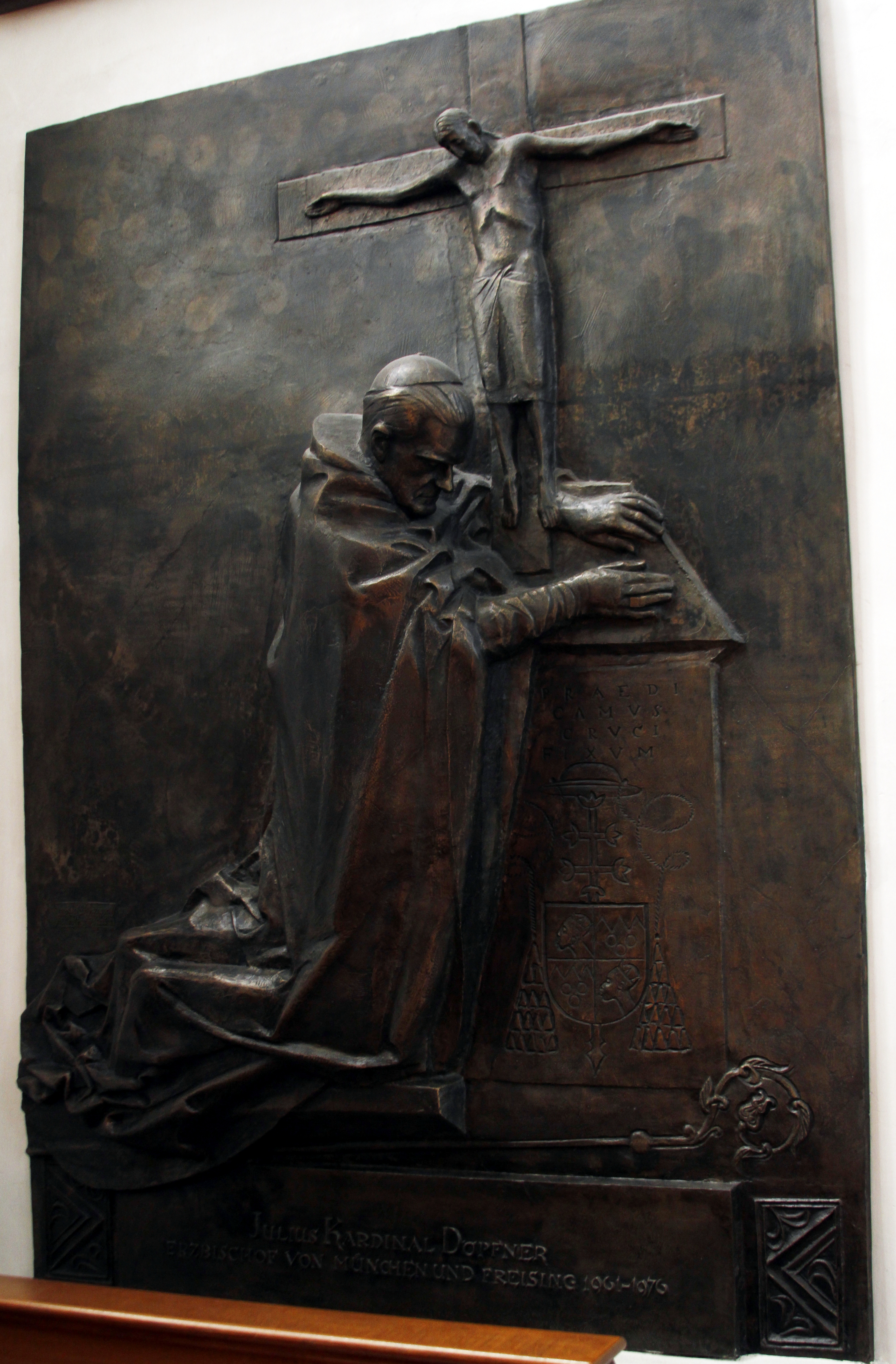 Frauenkirche - Munich - Germany